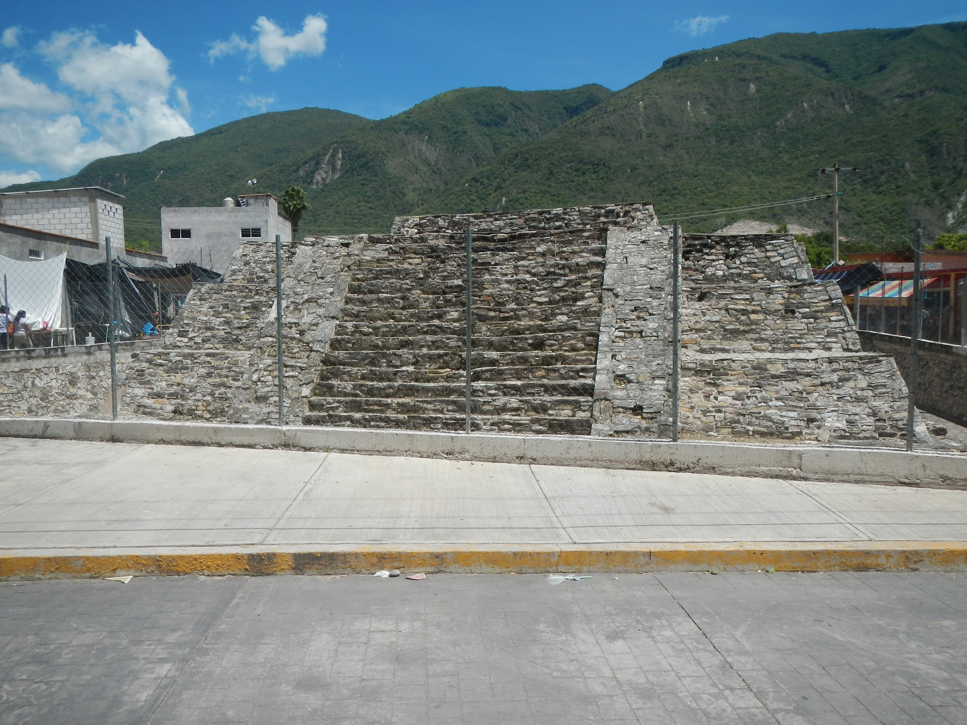 Frente de la pirámide de Huamuxtitlán, que existe en la población del mismo nombre en la región de la Montaña de Guerrero, se aprecia la escalinata de acceso con sus alfardas y los cuerpos que la conforman.